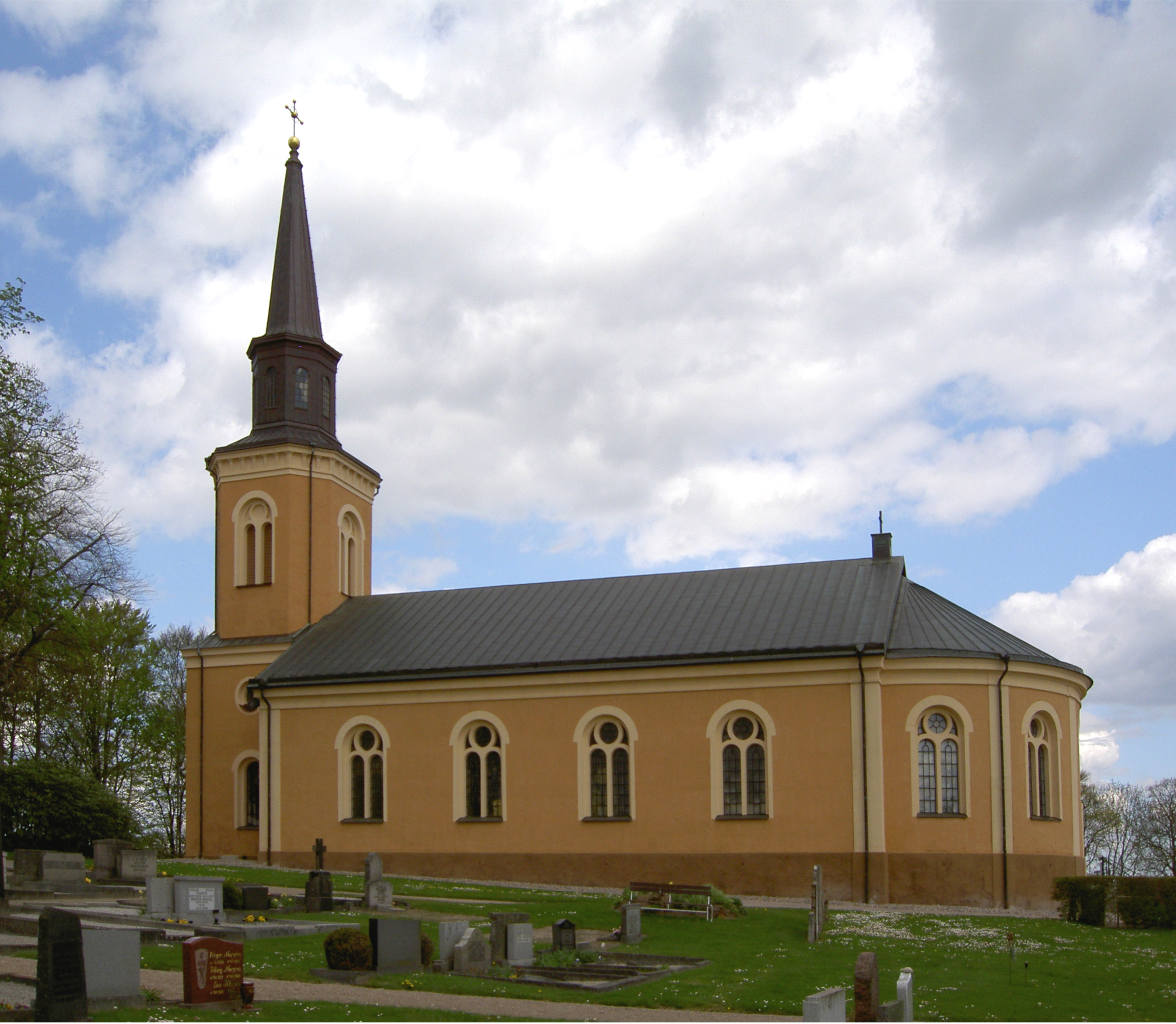 Norra Åkarps kyrka